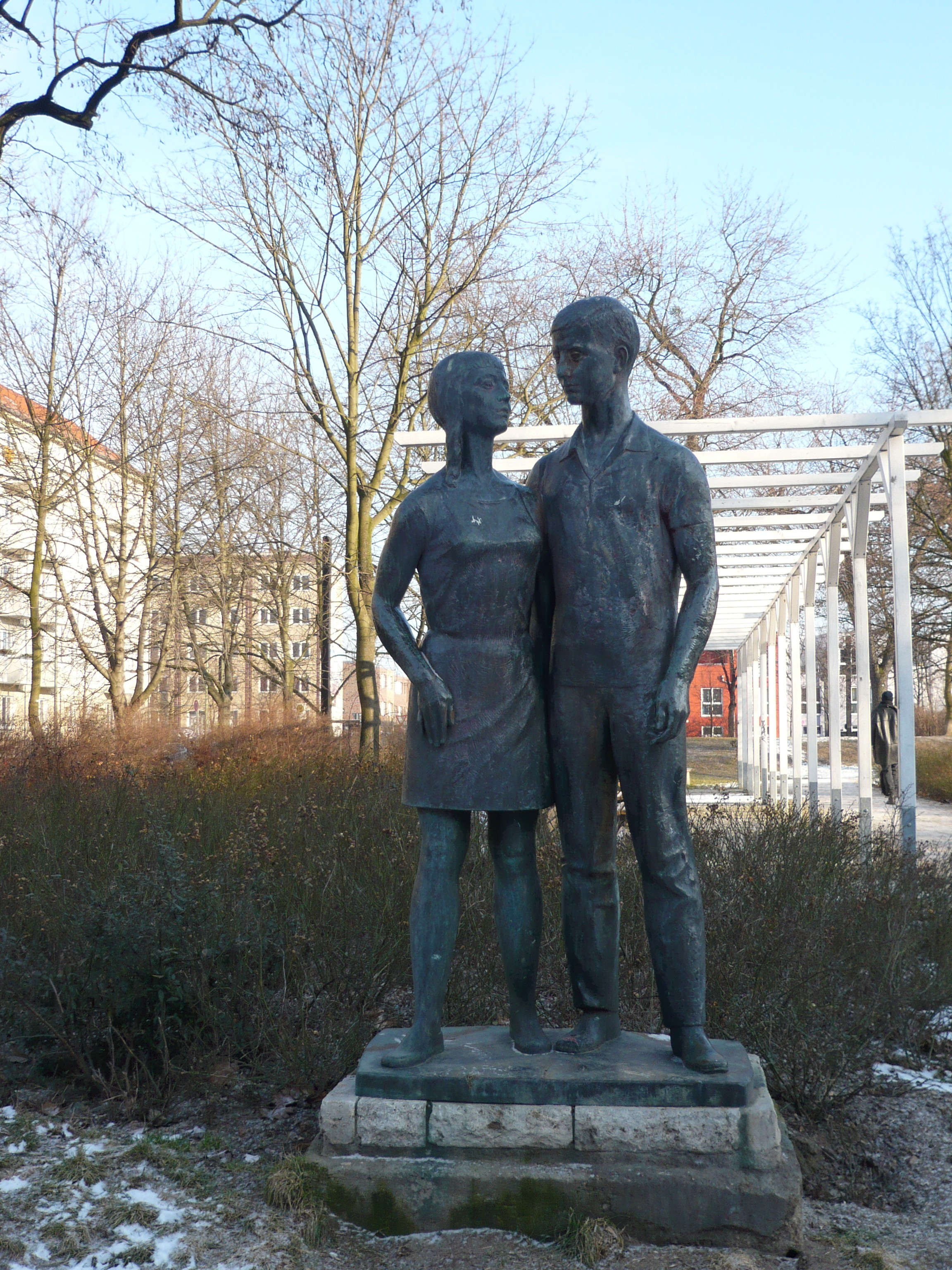 Forckenbeckplatz im Winter: "Junges Paar" von Erwin Damerow (1)